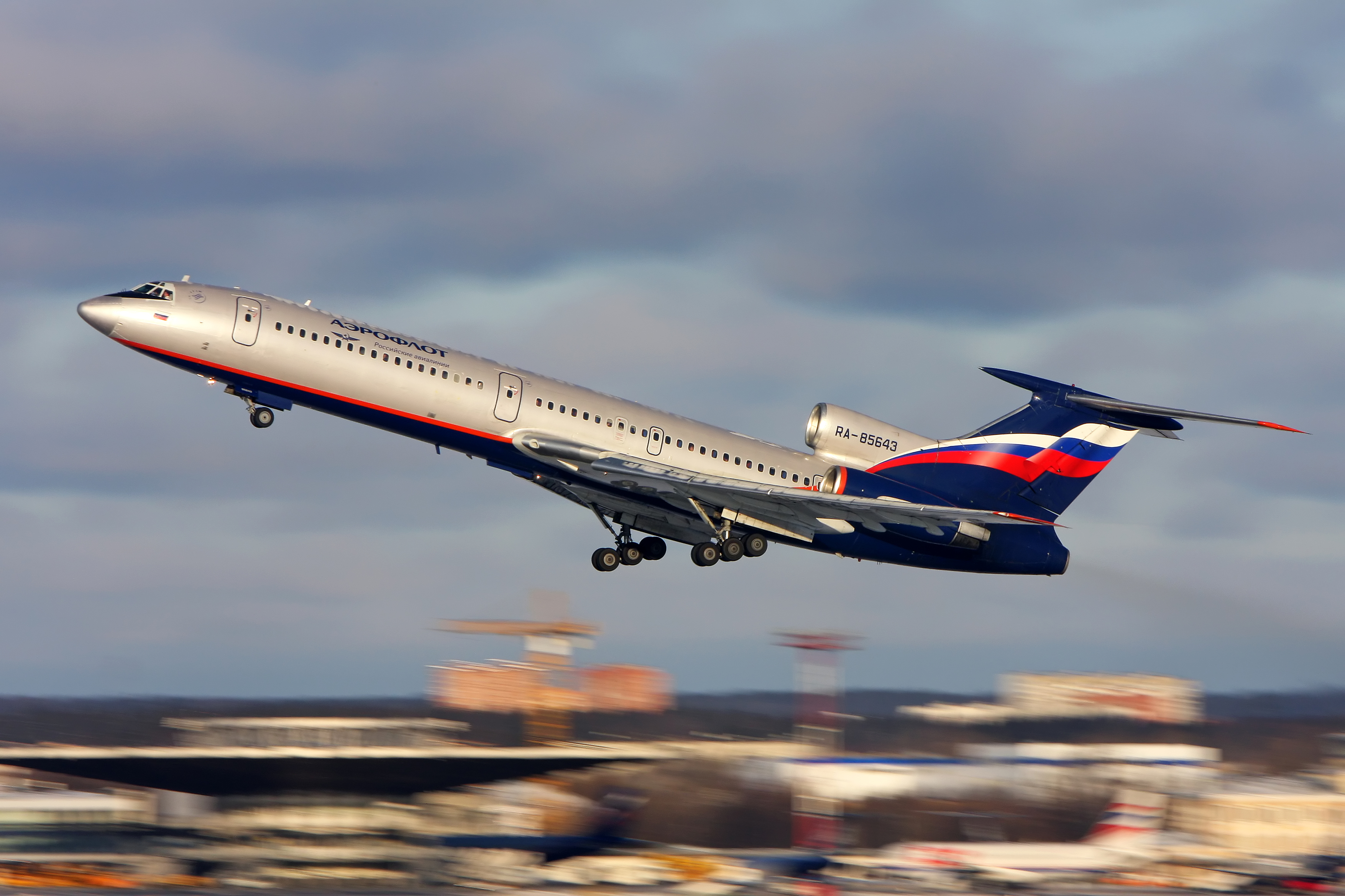 Aeroflot Tupolev Tu-154M RA-85643